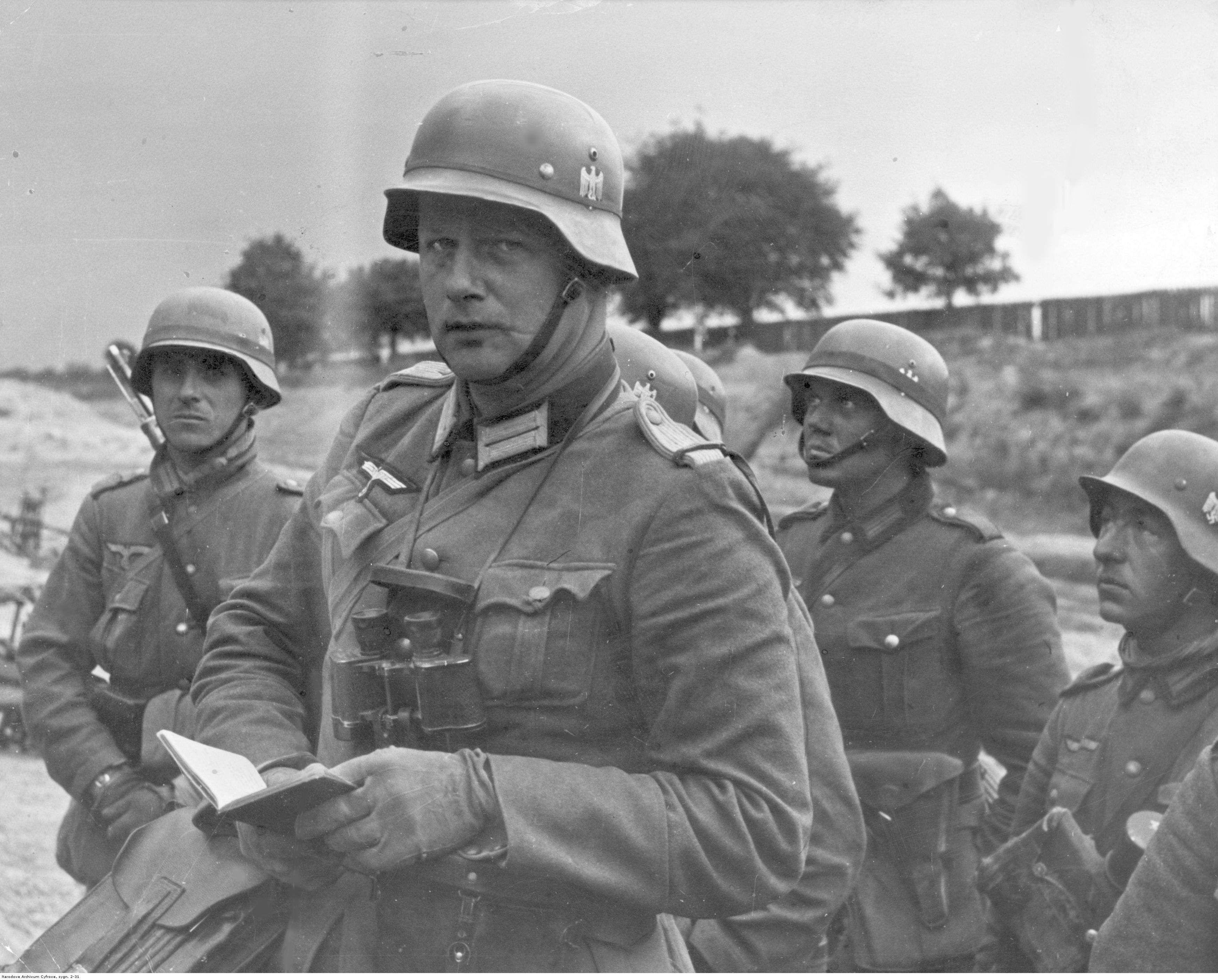 Żołnierze niemieccy podczas walk o Warszawę - fotografia sytuacyjna. Widoczny żołnierz z lornetką Dienstglas 6x30 na szyi.